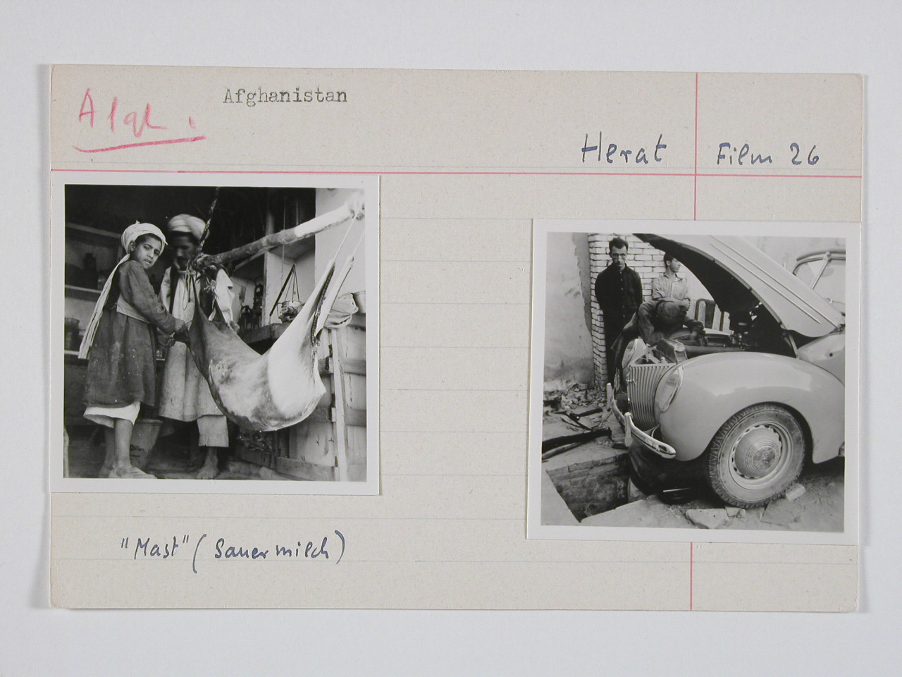 Afghanistan, Herat: Basar; Karteikarte: Zwei Männer neben einem aufgespannten Fell / Der Ford mit geöffneter Motorhaube